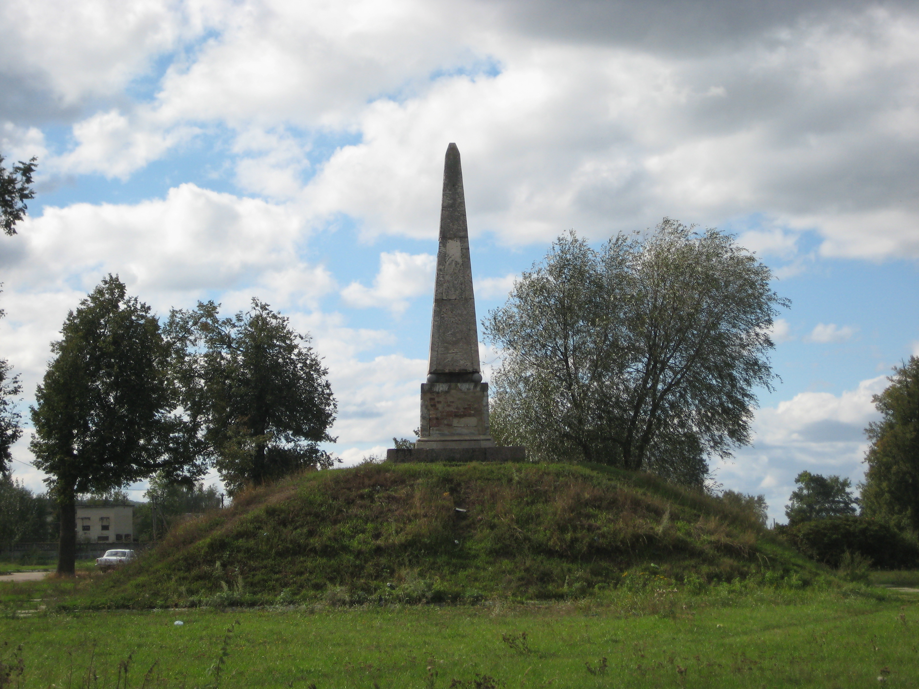 Троицкое, Калужская область. Розовый обелиск княгини Дашковой.